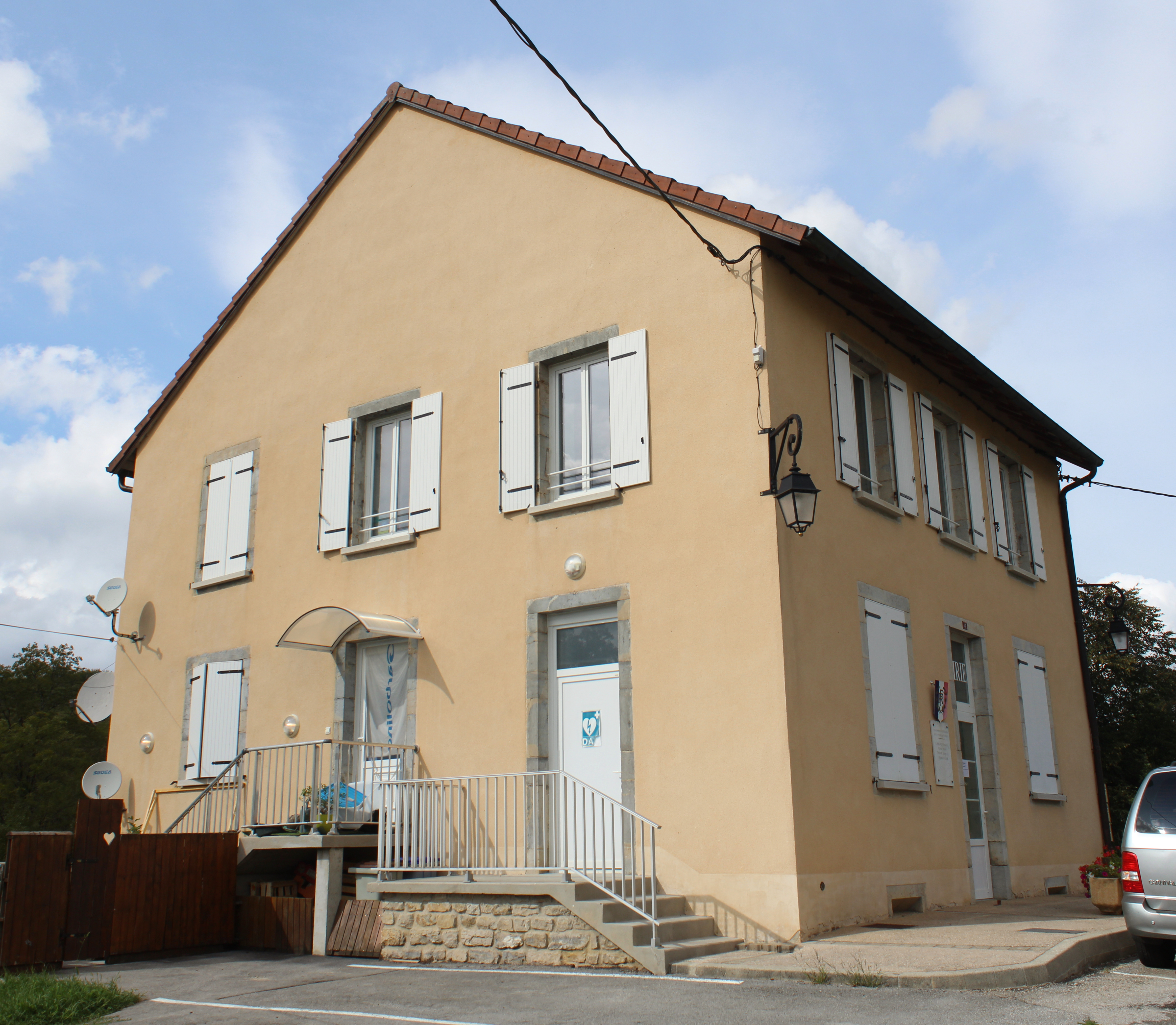 Mairie d'Écrille.